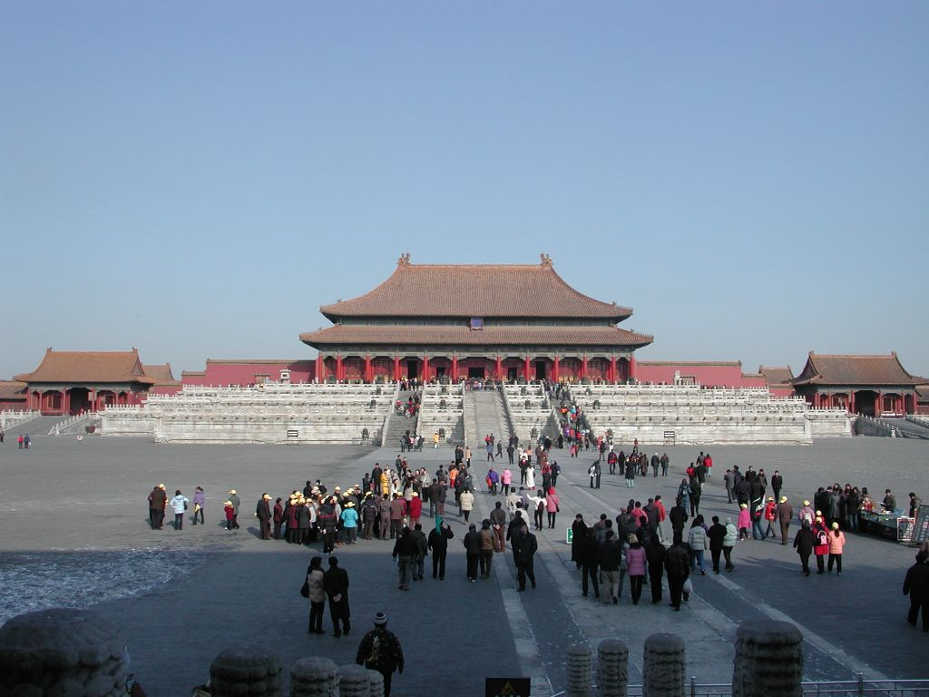 Herzlichen dank für die nicht informativen worte.